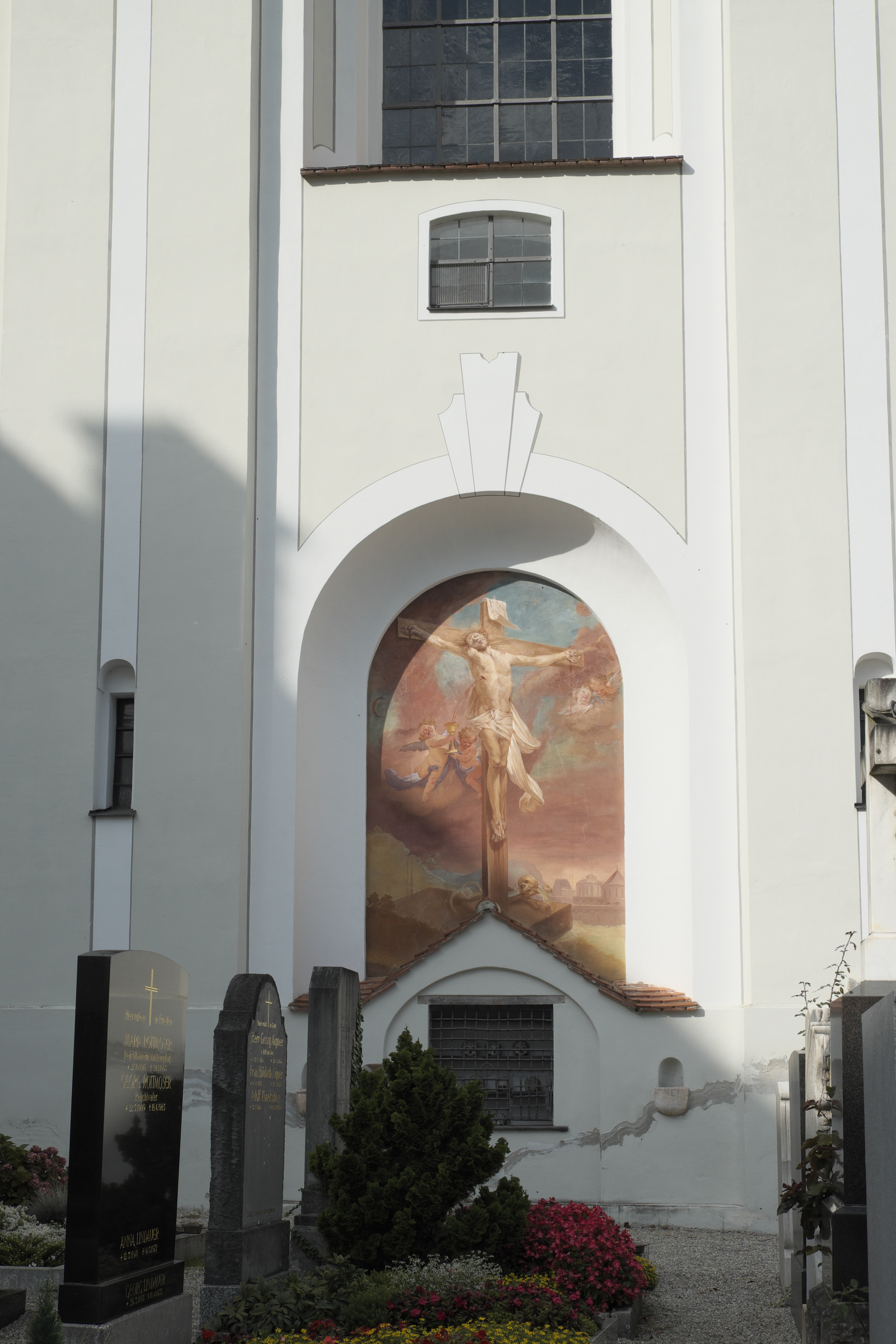 Katholische Pfarrkirche St. Marinus und Anianus, ehemalige Abteikirche des Benediktinerklosters Rott in Rott am Inn im Landkreis Rosenheim (Bayern/Deutschland), Kreuzigungsszene